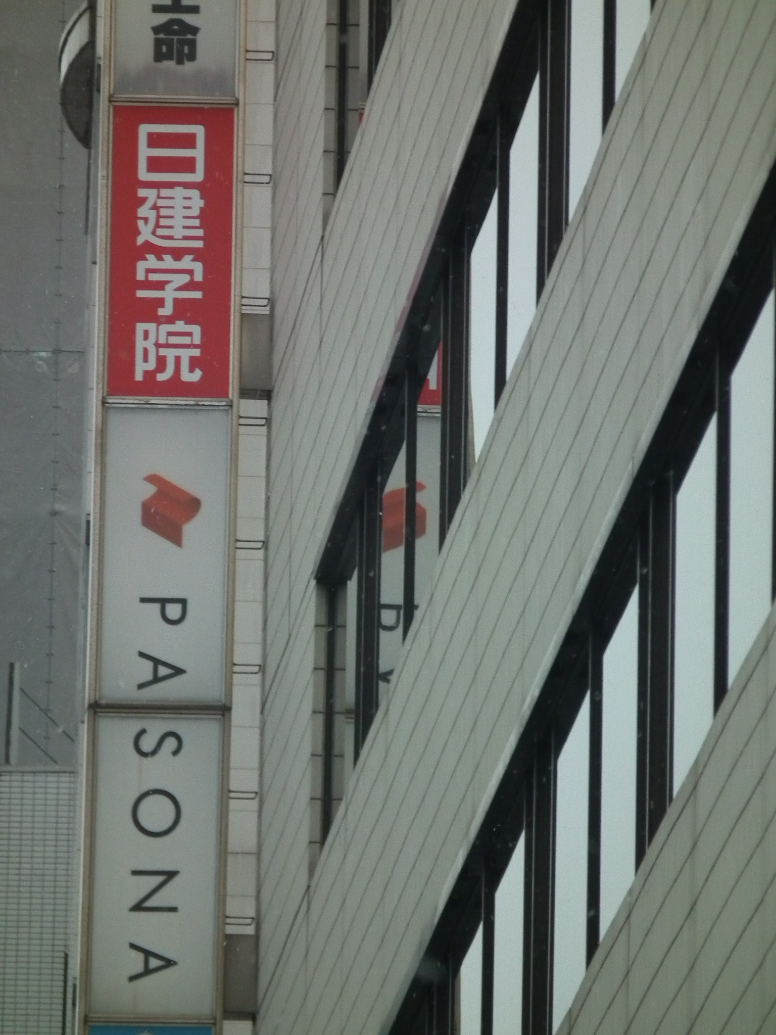 Nikken-gakuin Himeji 日建学院姫路校